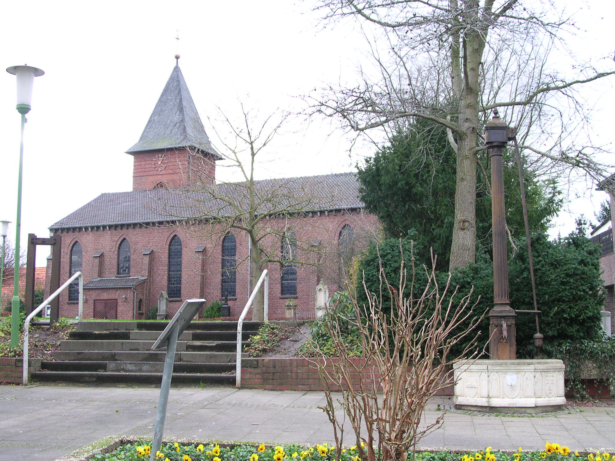 katholische Pfarrkirche St. Willibrordus in Loverich